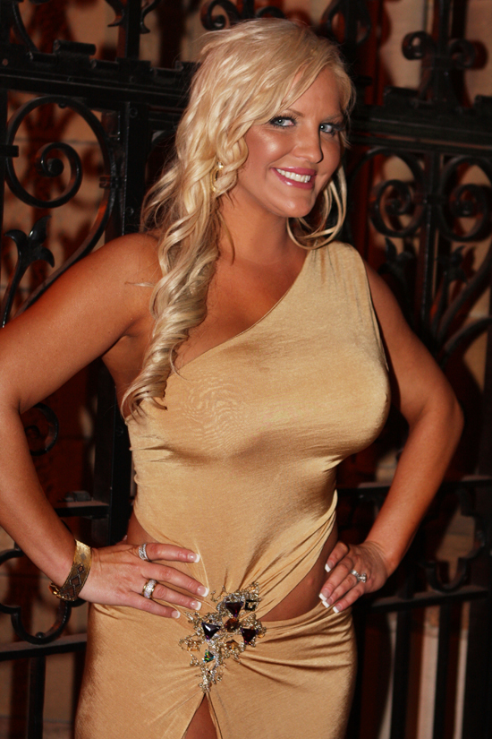 Brynne Edelsten